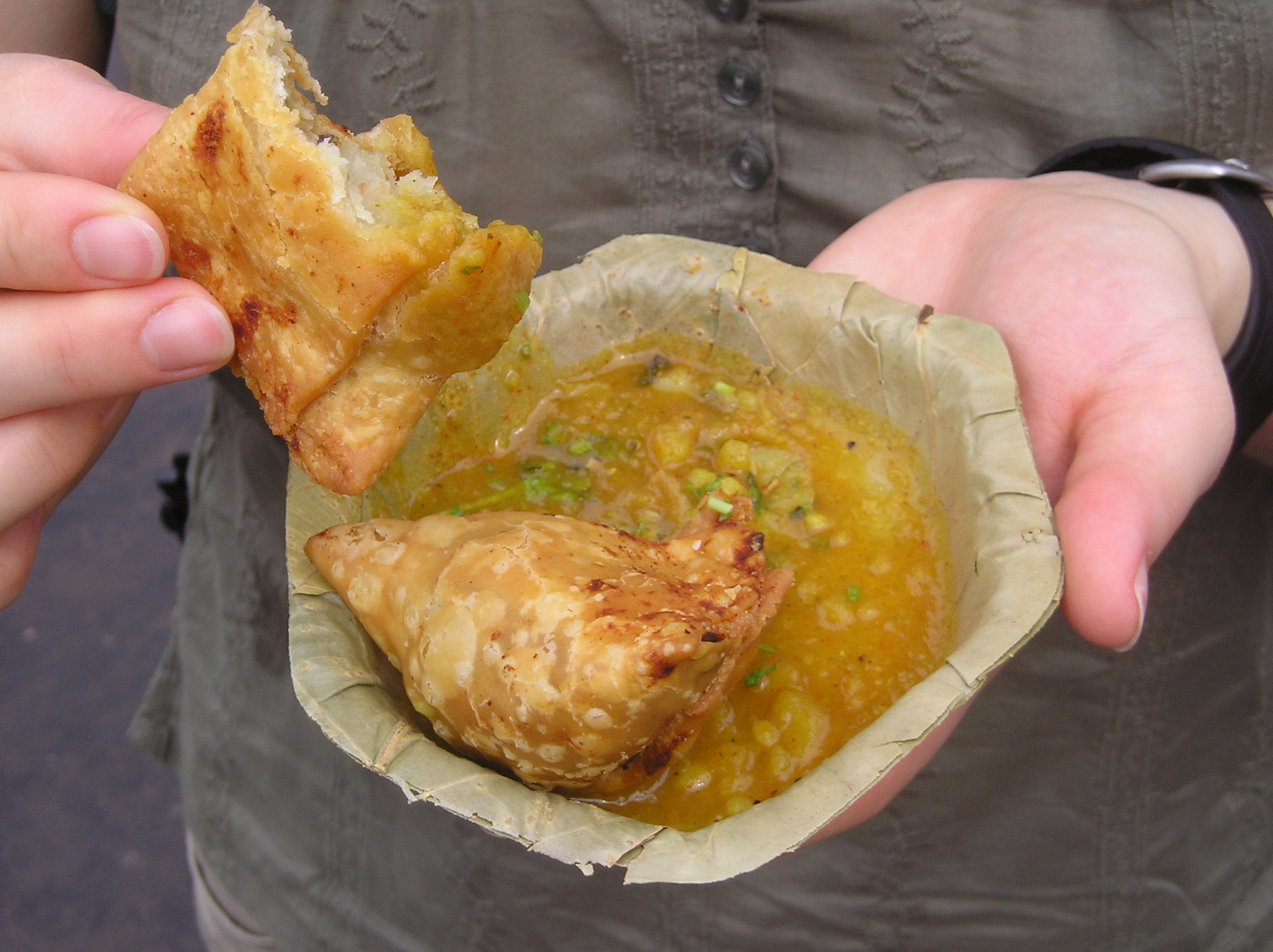 Samosa from Delhi's street market